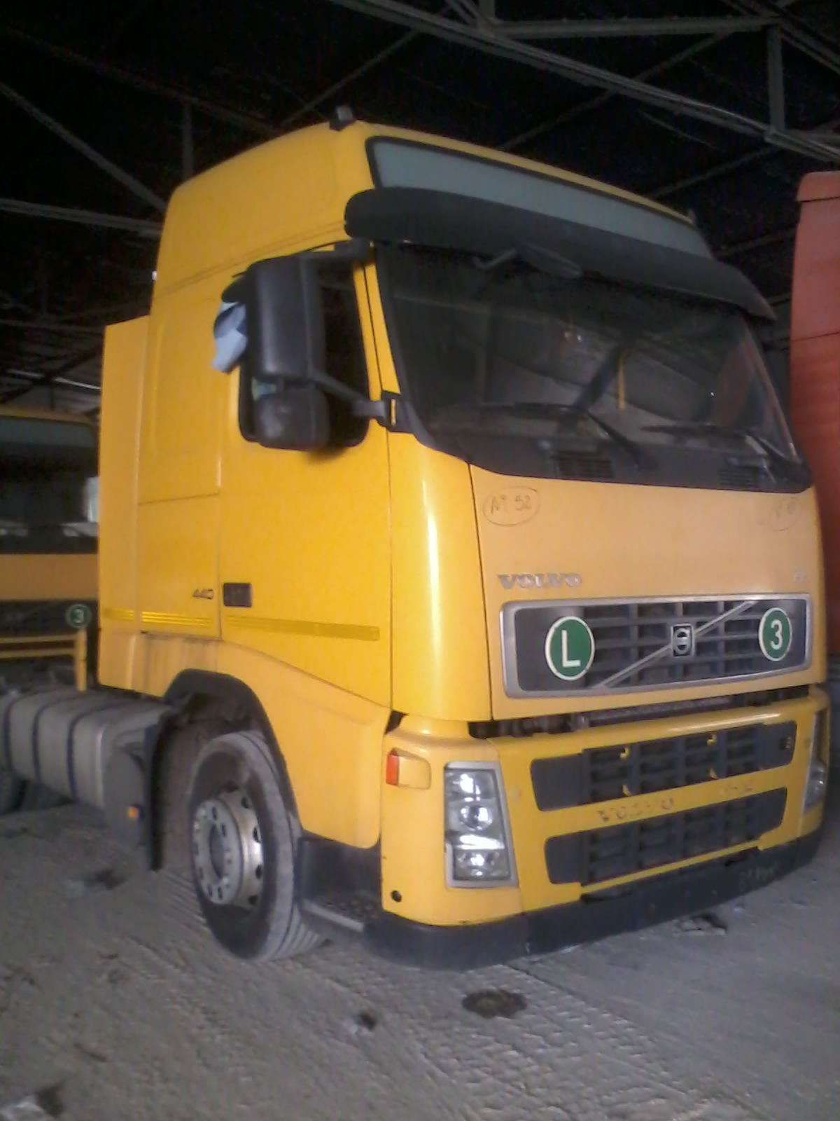 super